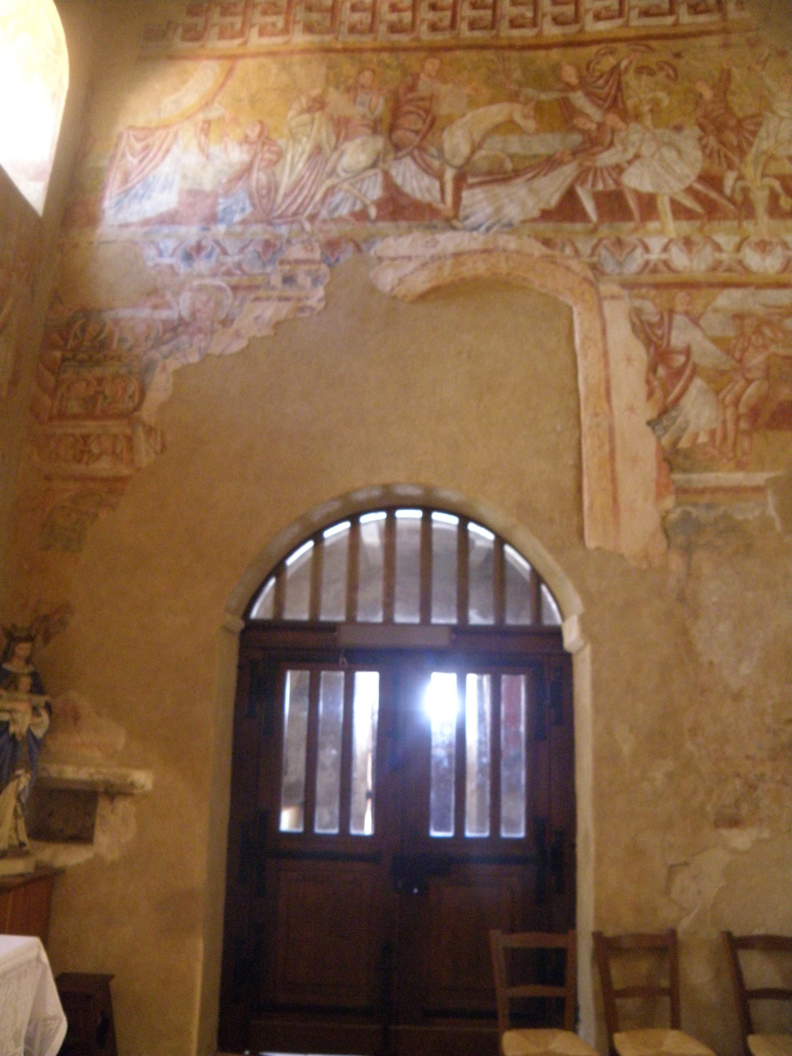 Vue d'ensemble du mur sud du chœur de l'église